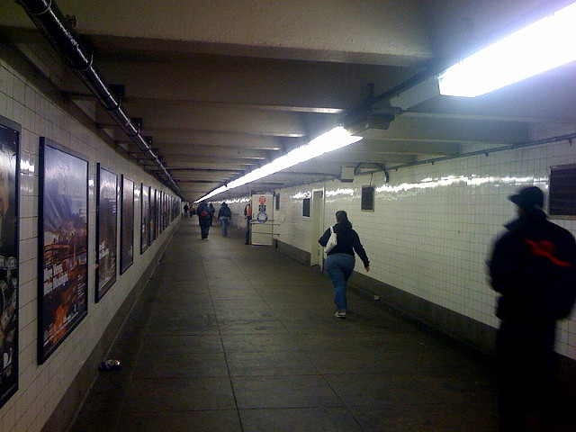 14th-street-tunnel.jpg